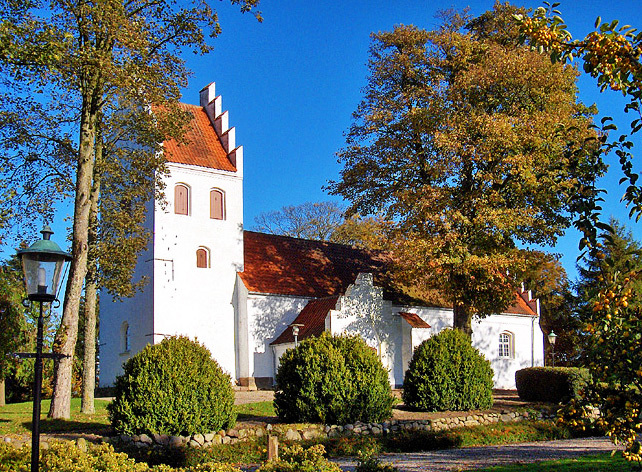 fra sydvest